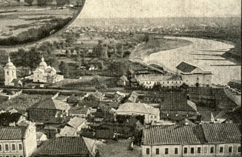 Беларуская (тарашкевіца): Магілёў (Mahiloŭ), вуліца Пакроўская (vulica Pakroŭskaja). Царква Покрыва Багародзіцы